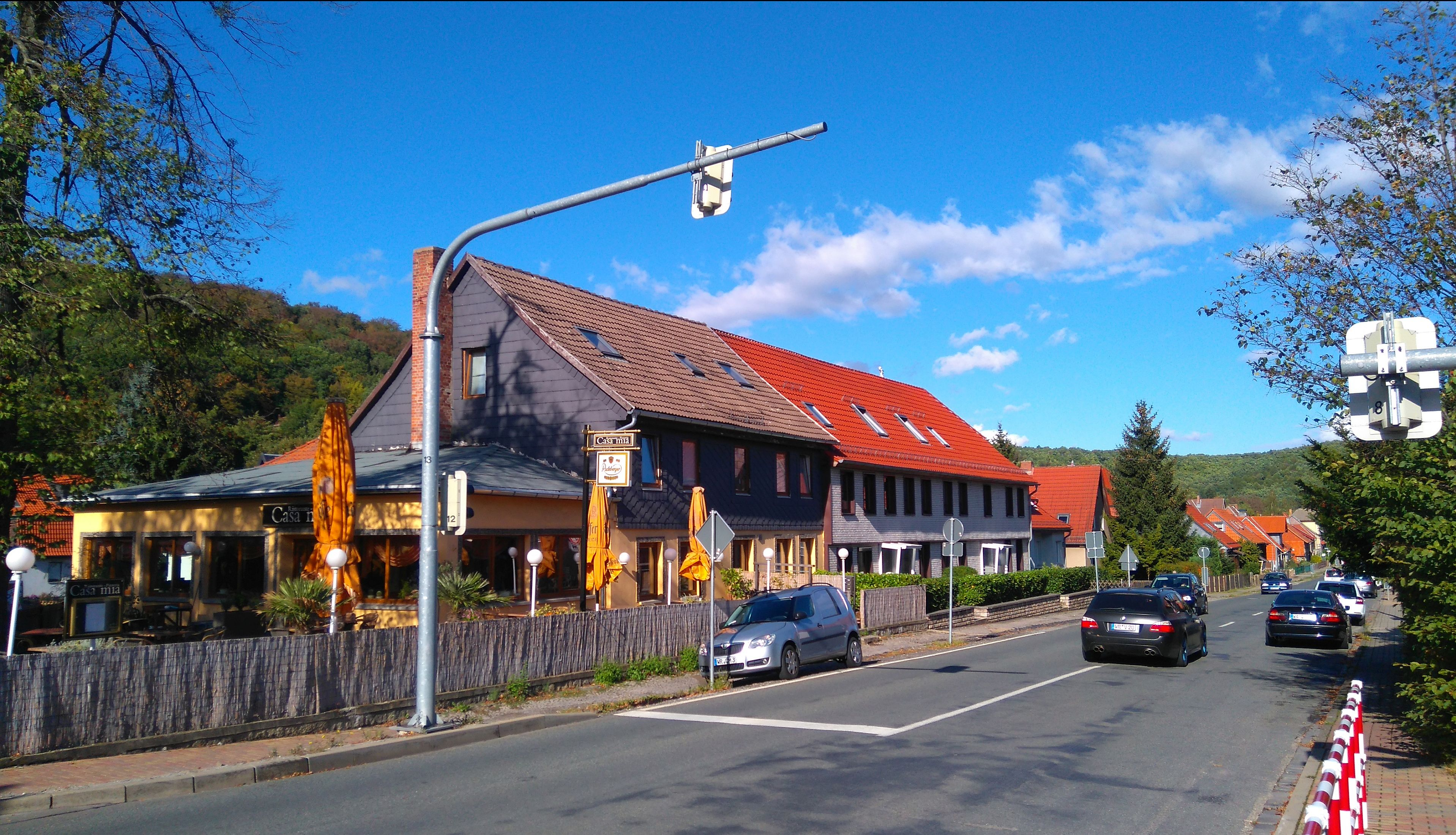 Wernigerode, Blick in den nordwestlichen Teil der Friedrichstraße